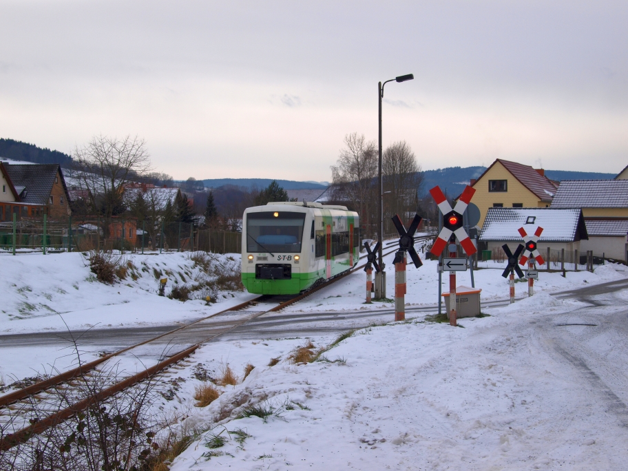 Bahnübergang Mittelschmalkalden